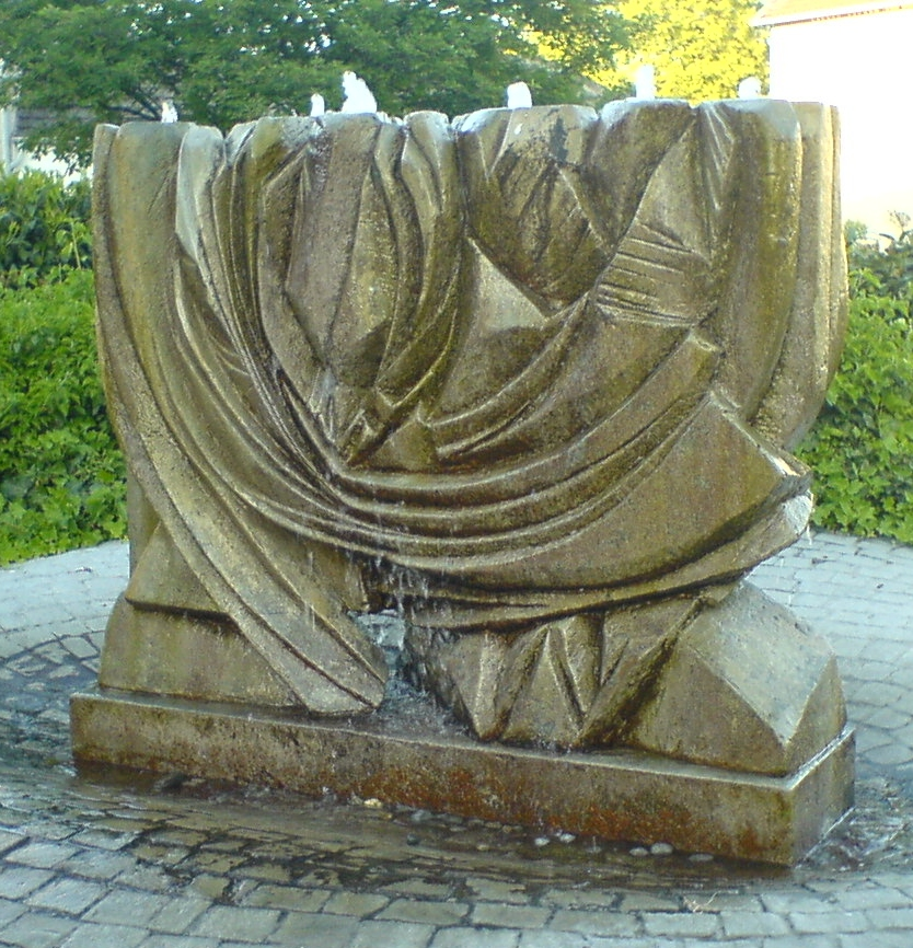 Skulptur von Otto Ditscher "Vegetativ aus Beton" vor dem Rathaus Neuhofen (Pfalz)